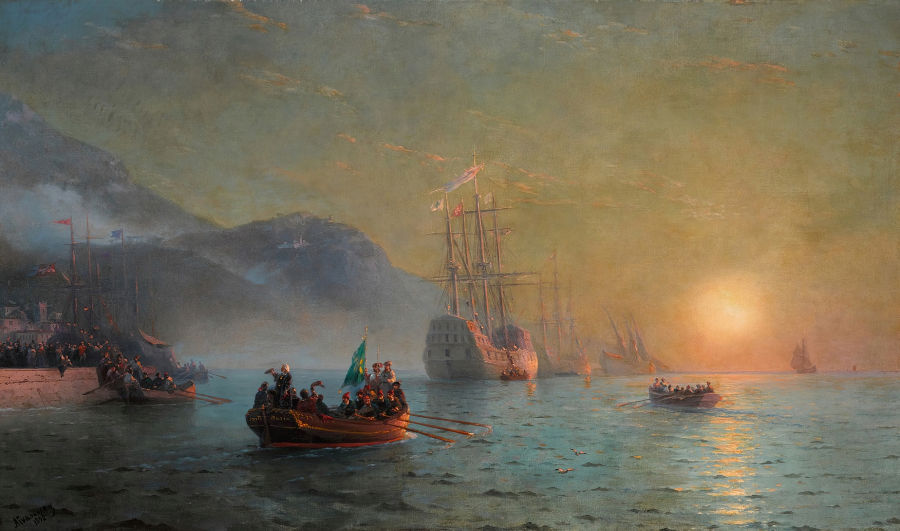 Cuadre d' Aivazovsky Ivan Konstantinovic Colon Sortint de Palos